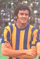 Eduardo Solari, futbolista de Rosario Central en 1974.